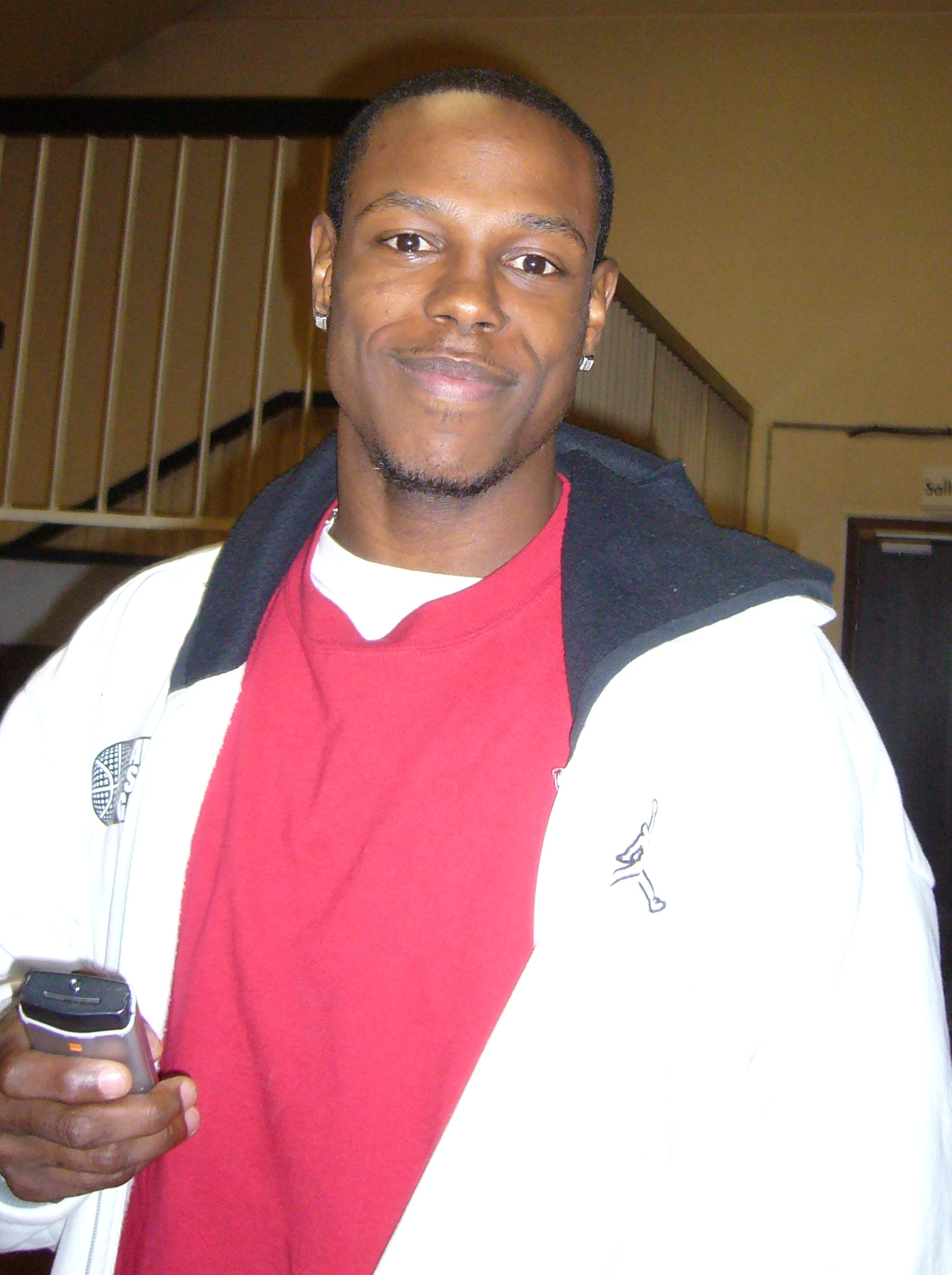 Le joueur américain de basket-ball Jimmal Ball (JA VIchy), dans les couloirs de la maison des sports de Clermont-Ferrand.